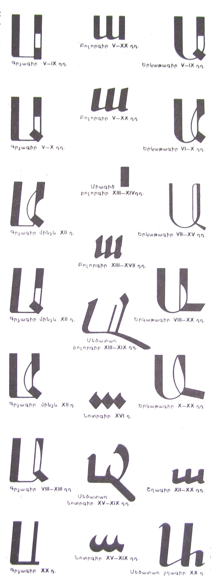 Ա տառը